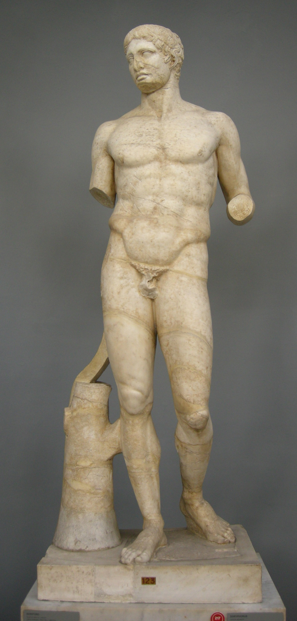 Doriforo, copia romana da originale di Policleto (440 ac. circa), inv. 2215